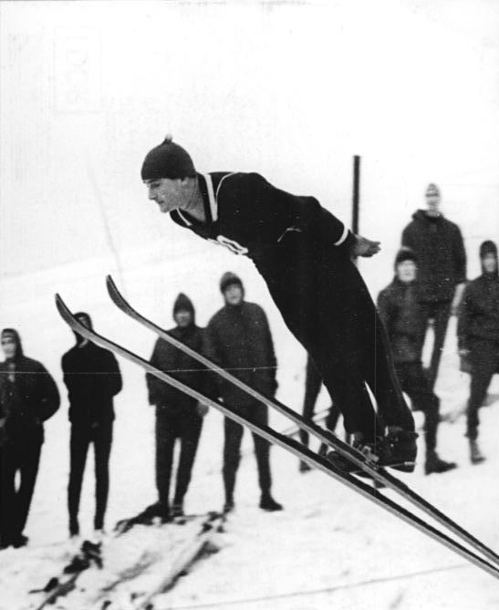 Zentralbild Gahlbeck 29.1.1962 Veit Kührt vor Helmut Recknagel Veit Kührt vor Olymipasieger Helmut Recknagel (beide SC Motor Zella-Mehlis) und Dietmar Klemm (SC Dynamo Klingenthal) lautete am 28.1.1962 vor etwa 3000 Zuschauern in Oberwiesenthal die Reihenfolge beim 6. Qualifikationssprunglauf der DDR-Elite für die Weltmeisterschaften in Zakopane. UBz: Veit Kührt geht über die Schanze.